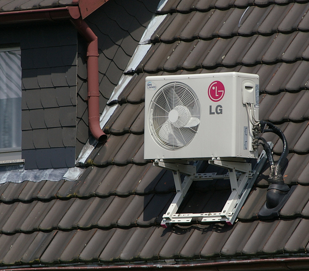 Außenmodul einer typischen Split-Klimaanlage, hier auf dem Dach eines Einfamilienhauses